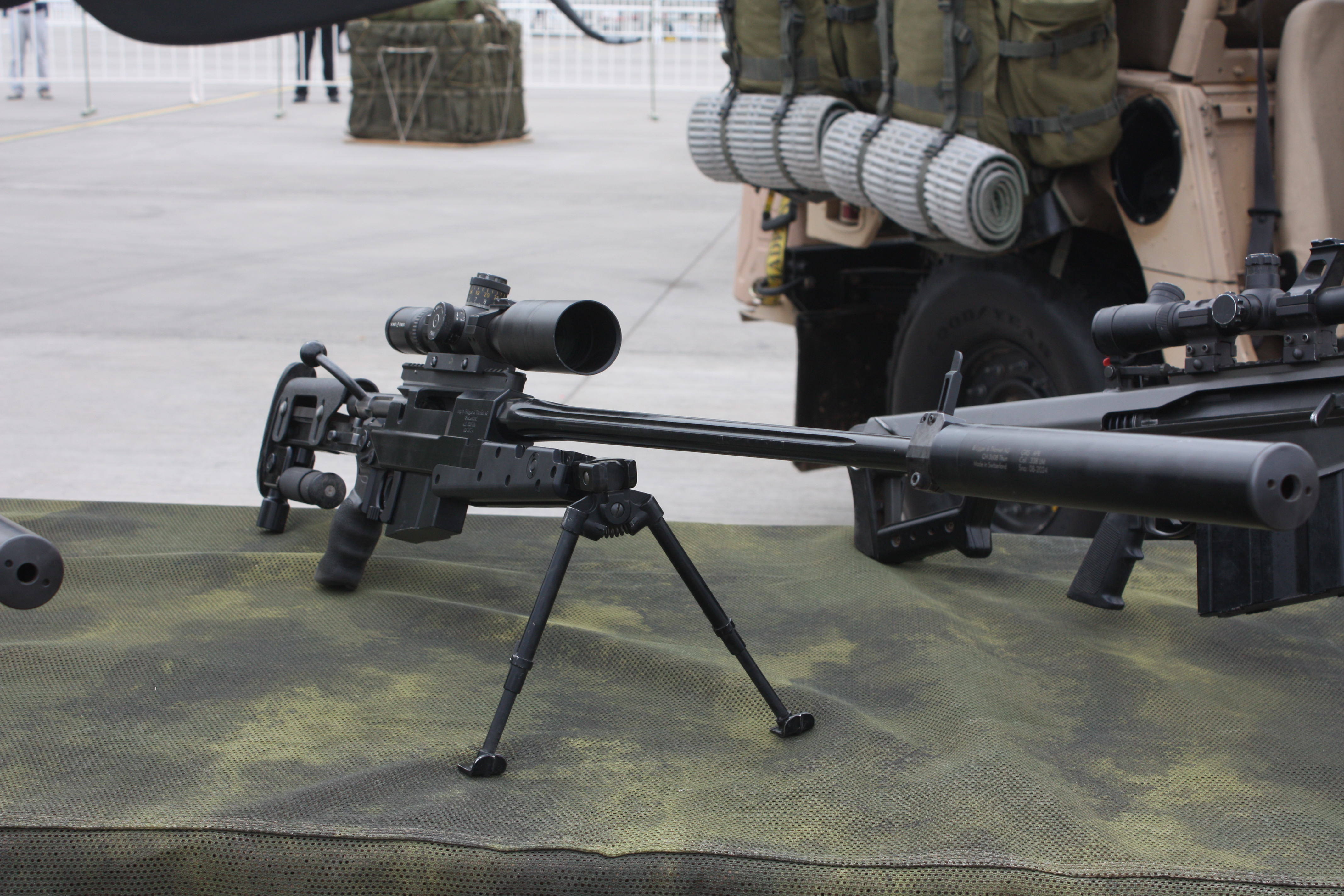 Brügger & Thomet APR338 chambered in .338 Lapua Magnum silenciada Ejercito de Chile expuesta en Fidae 2016